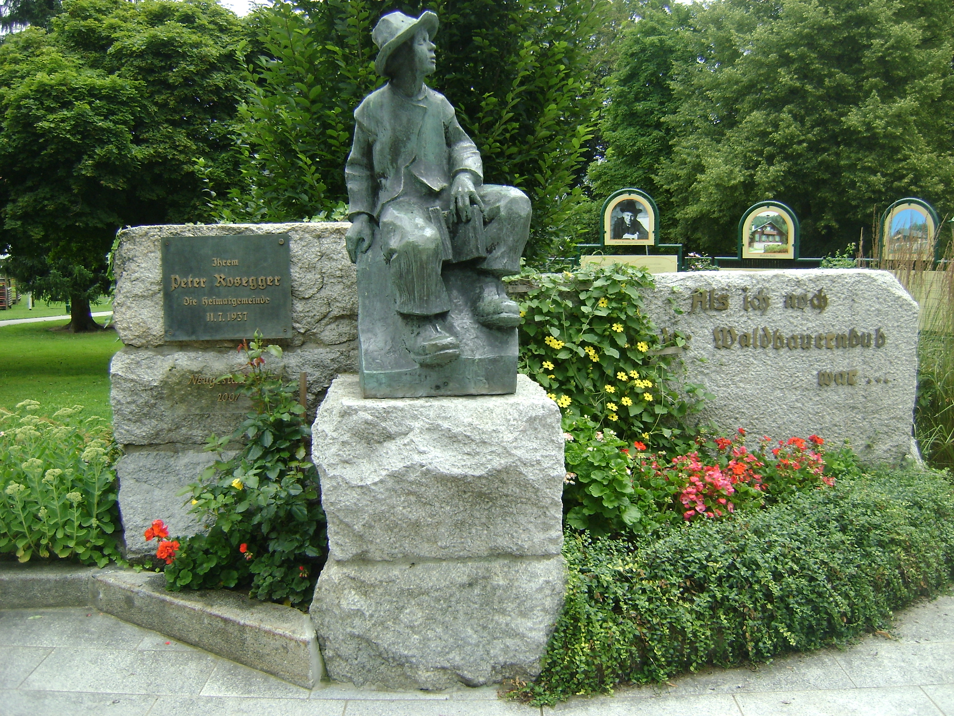 Das Roseggerdenkmal im Roseggerpark, Krieglach